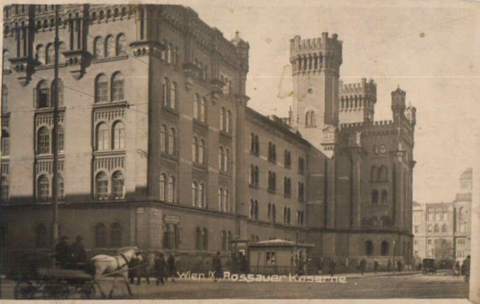 Ansicht der Rossauer-Kaserne in Wien